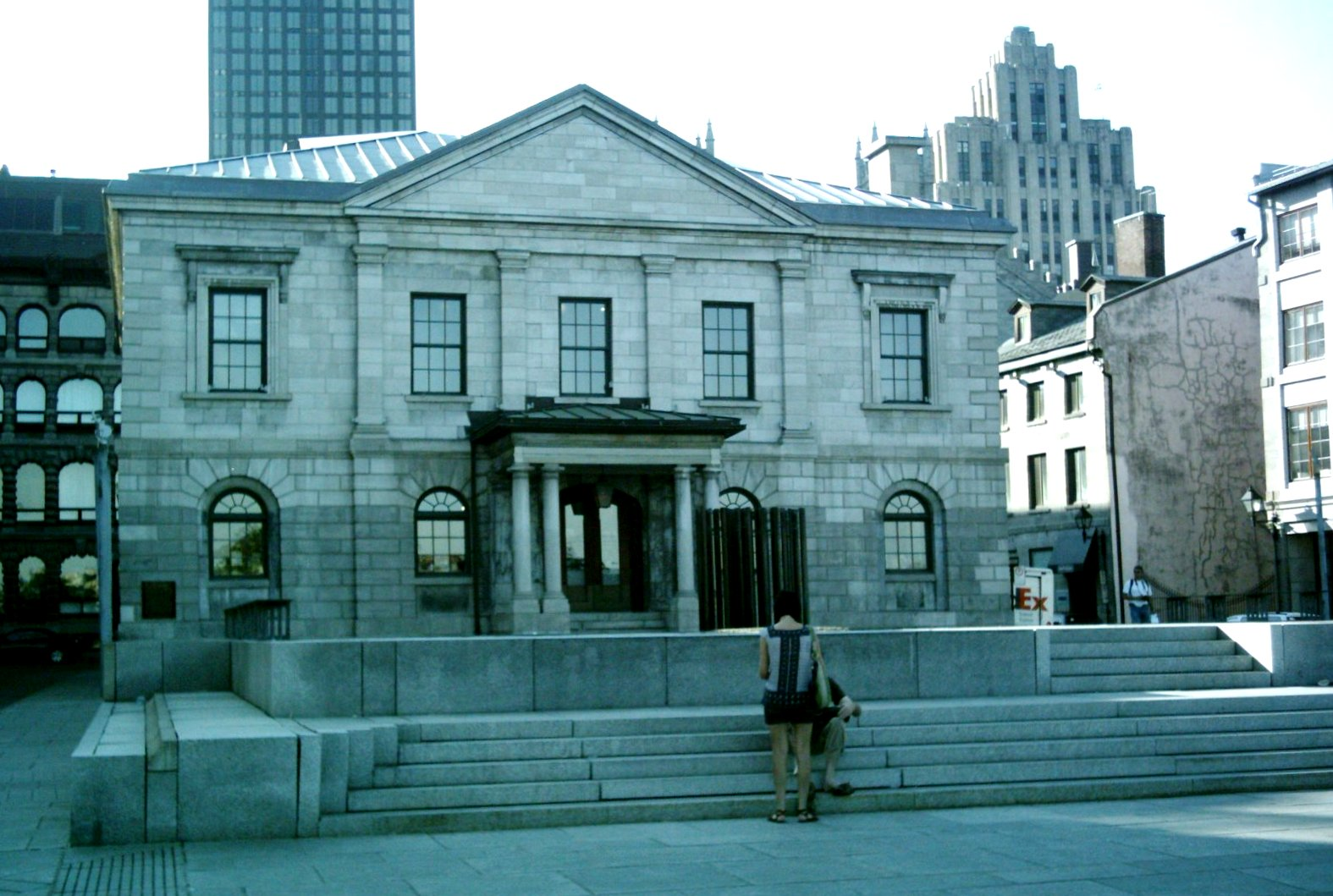 Vue arrière de l'Ancienne-Douane de Montréal (côté sud) et la Place Royale. Elles font maintenant partie du complexe muséal de Pointe-à-Callière, musée d'archéologie et d'histoire de Montréal.